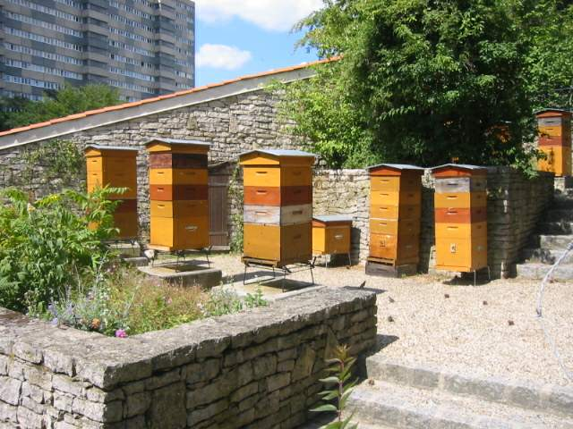 Rucher pédagogique du parc Georges-Brassens (inauguré en 1986), parc Georges-Brassens, XVe arrondissement, Paris, France.